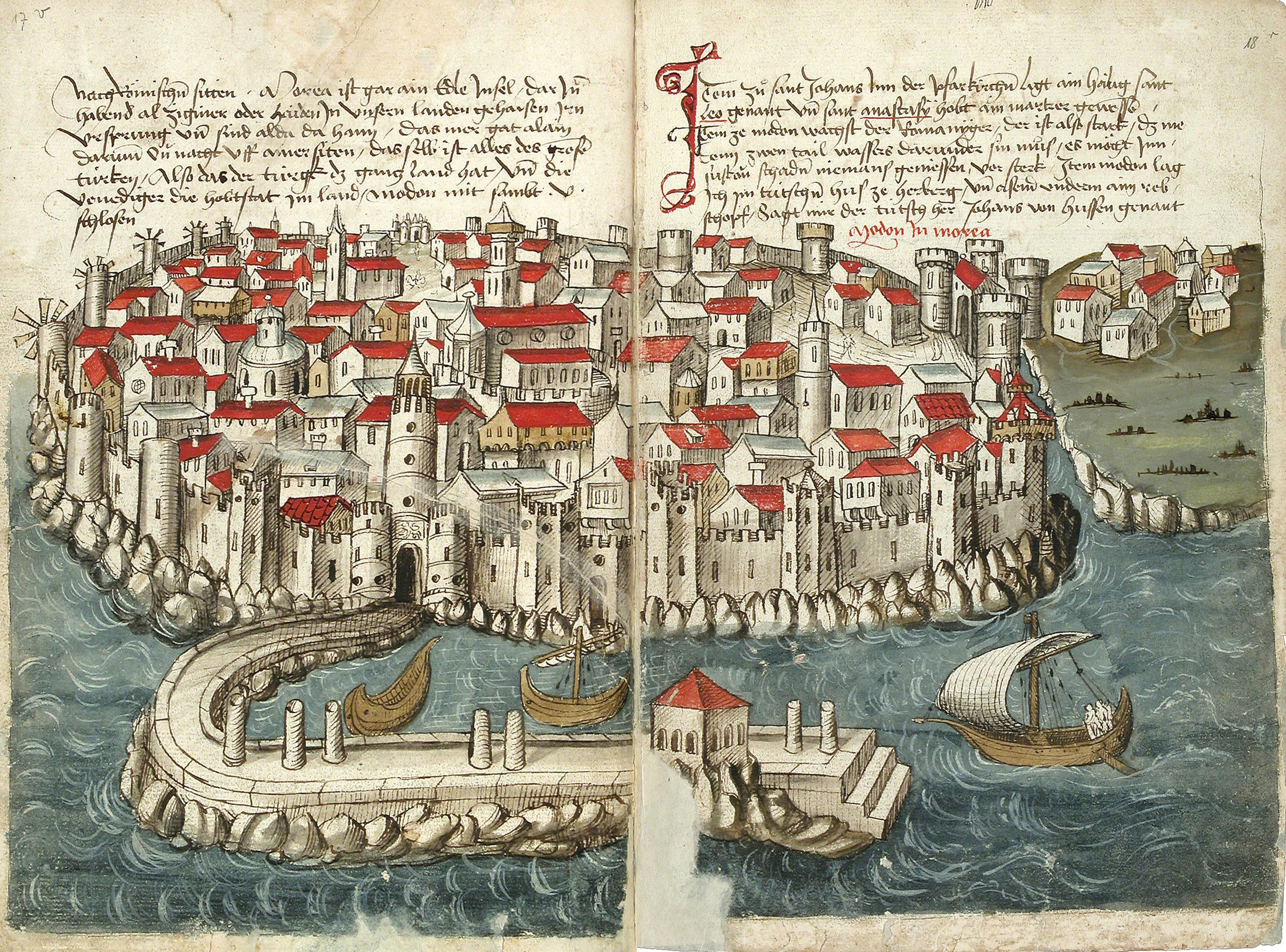 Doppelseite, aus Conrad Grünenberg: Beschreibung der Reise von Konstanz nach Jerusalem. Bodenseegebiet, um 1487. Badische Landesbibliothek Karlsruhe, Cod. St. Peter, pap. 32.